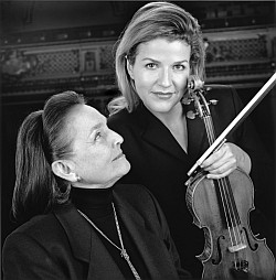 Aida Stucki zusammen mit Anne Sophie Mutter